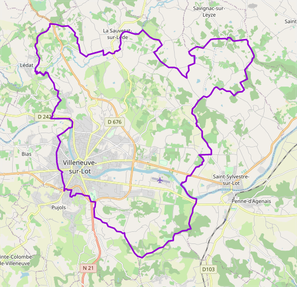 carte réalisée sur umap This map may be incomplete, and may contain errors. Don't rely solely on it for navigation.